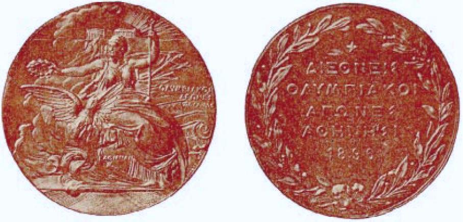 Erinnerungsmedaille aus Kupfer